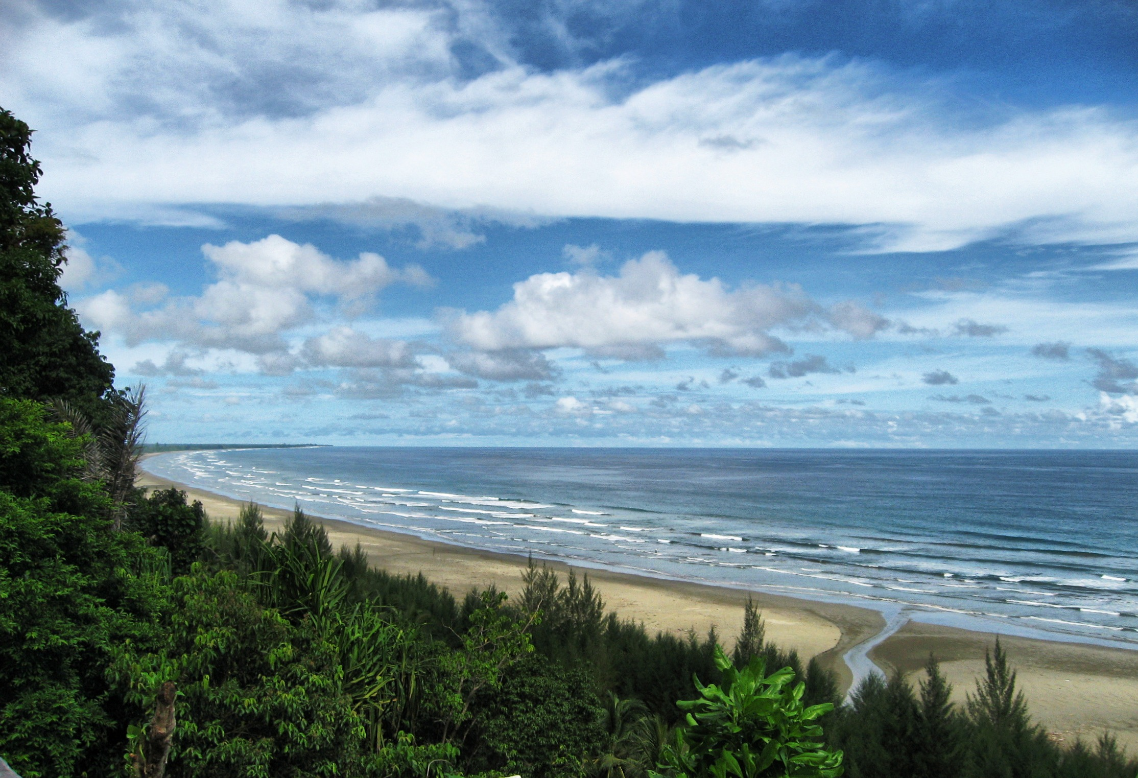 Lhok Rukam, Tapak Tuan, South Aceh Regency, Aceh, Indonesia